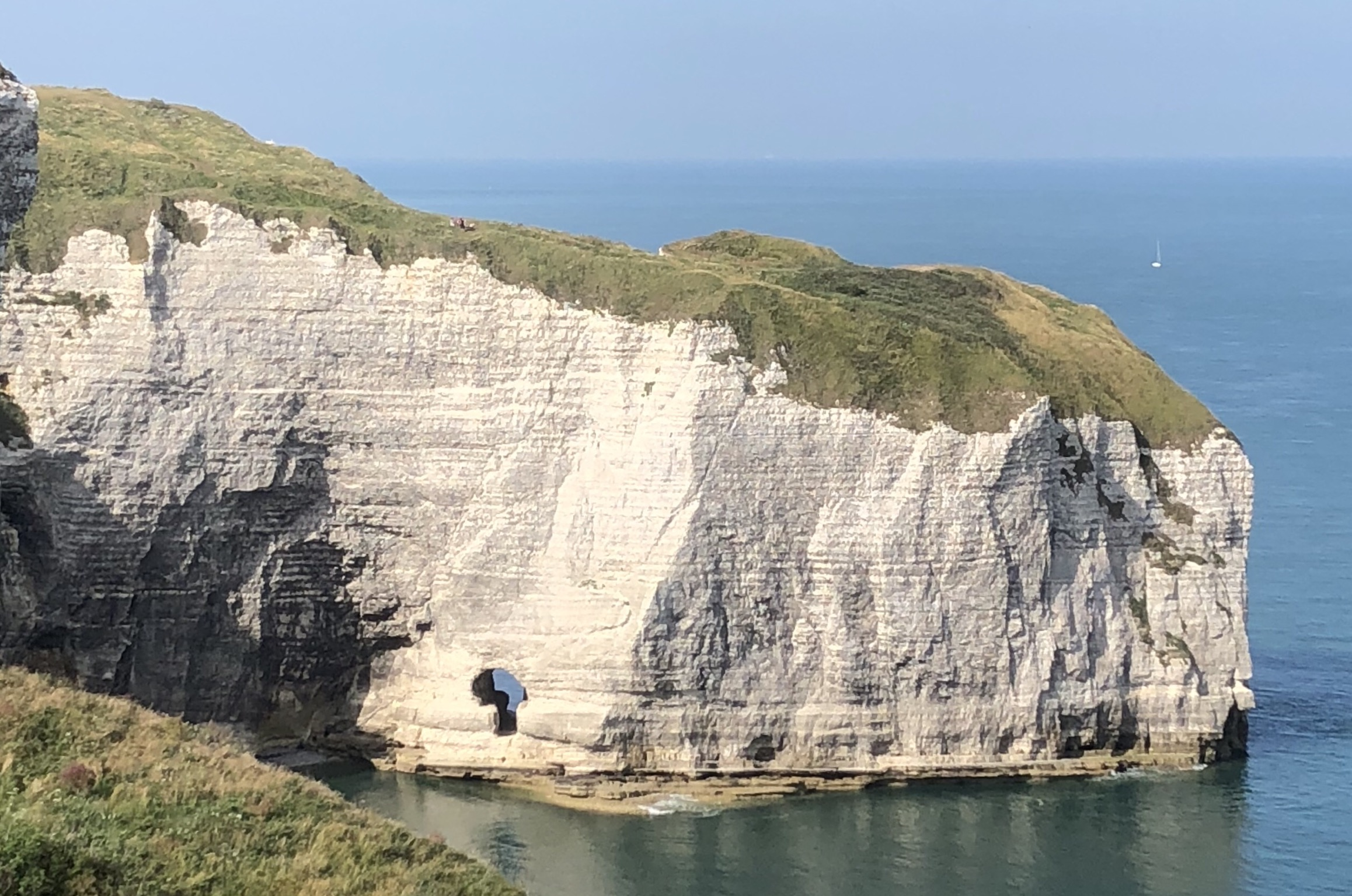 Schlüsselloch im Felsen bei Etretat (Ausschnitt)